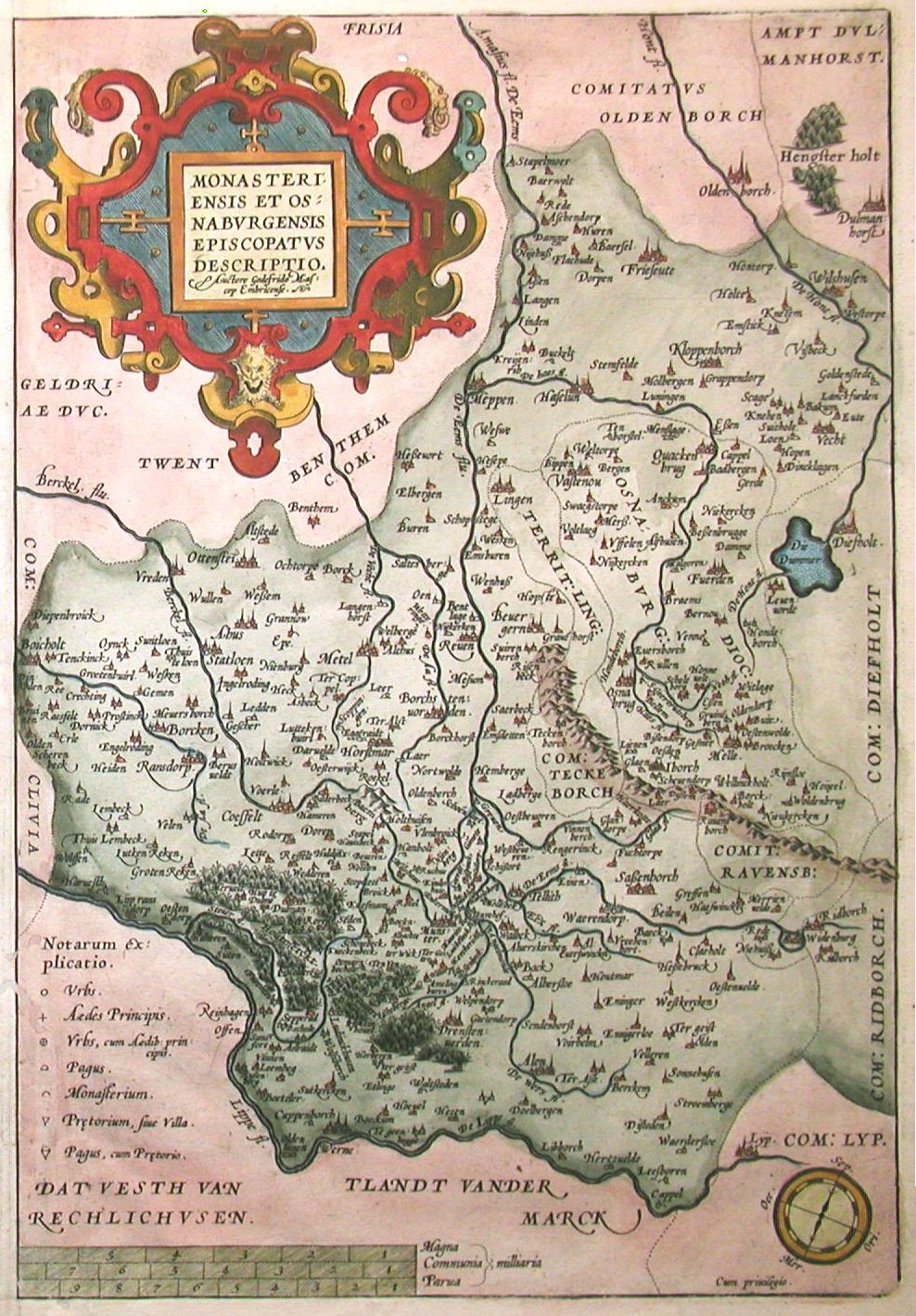 Monasteriensis et Osnaburgensis Episcopatus Descriptio. Auctore Godefrido Mascop Embricense